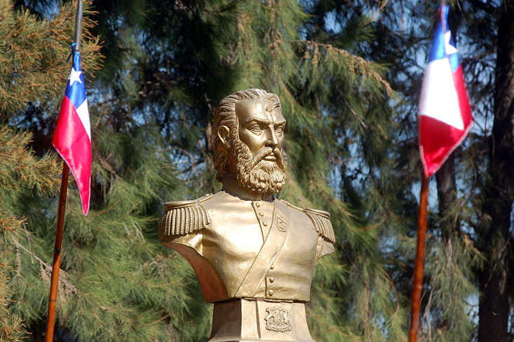 Busto del Coronel chileno Santiago Bueras.